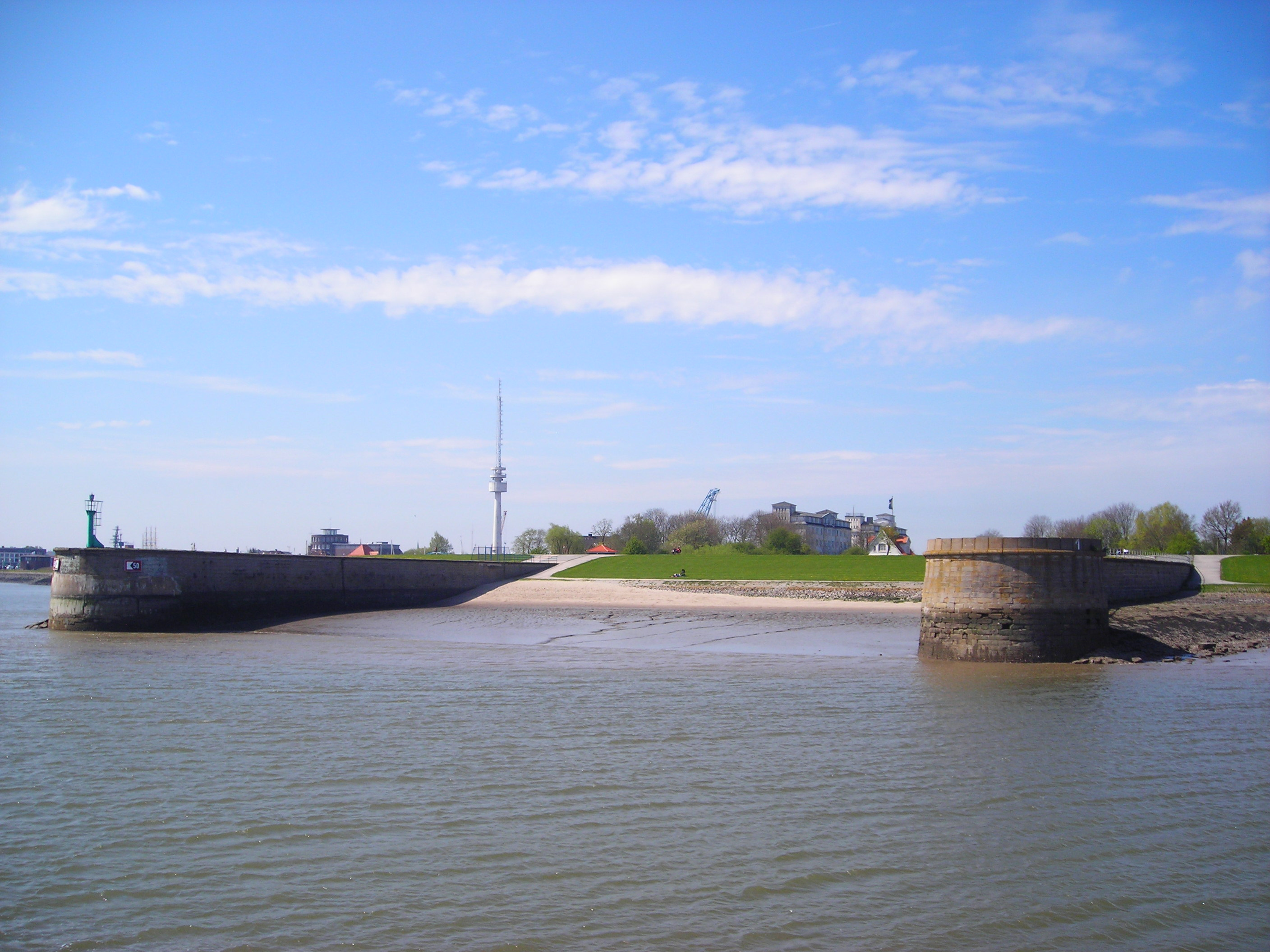 Die äußeren Molenköpfe der ehemaligen Zweiten Einfahrt in Wilhelmshaven